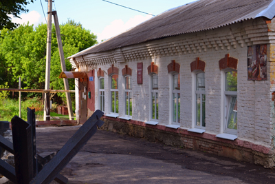 п.Одоев, улица К.Маркса, дом 35-а